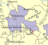 Map of Fürstbistum Hildesheim 1648